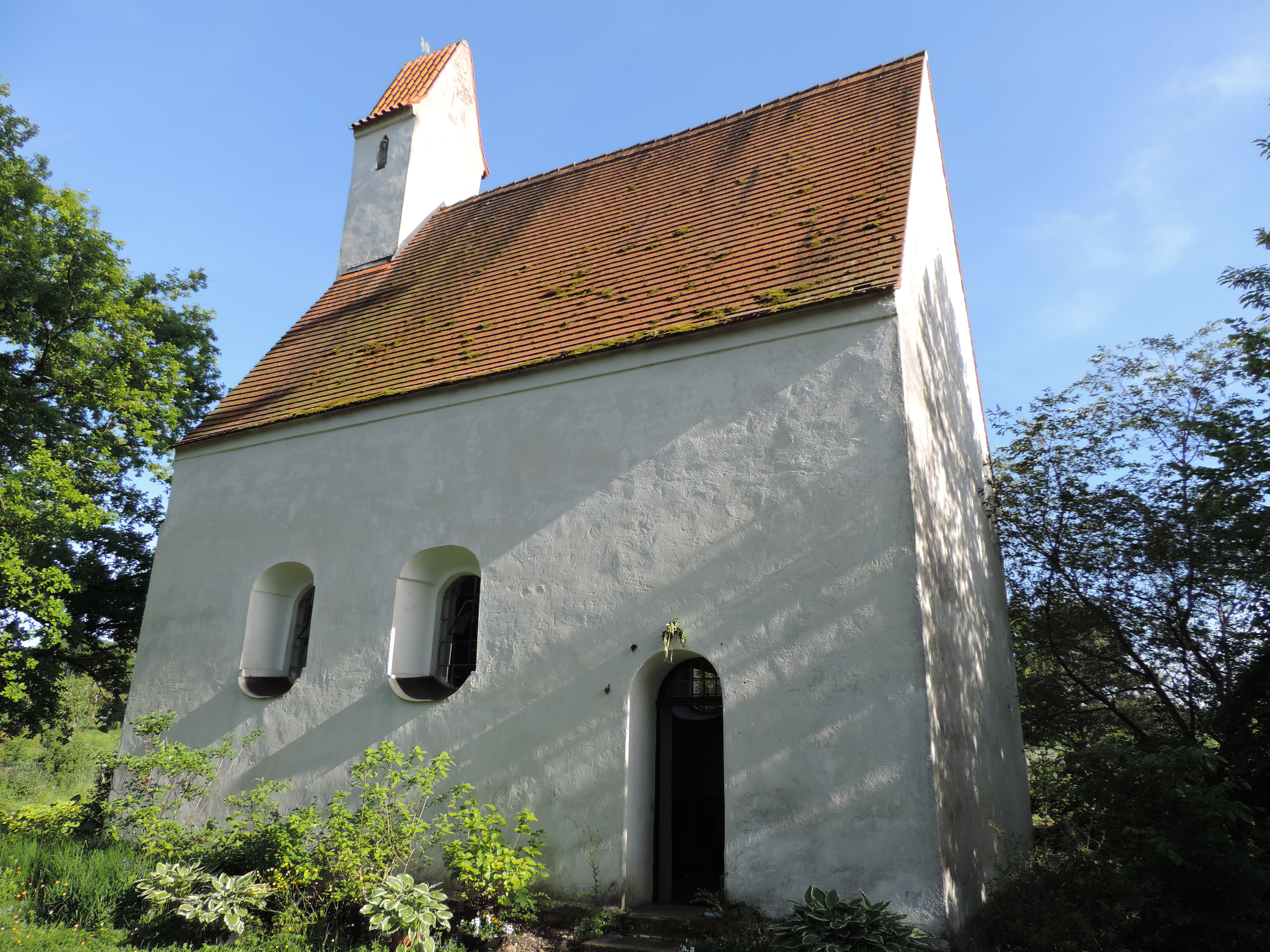 Nordseite